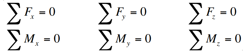 Oreka ekuazioak